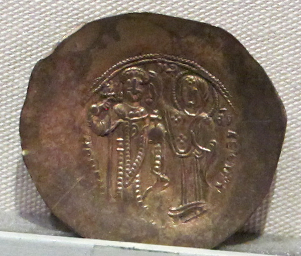 The coin of the Emperor Manuel I. Palazzo Massimo alle Terme.